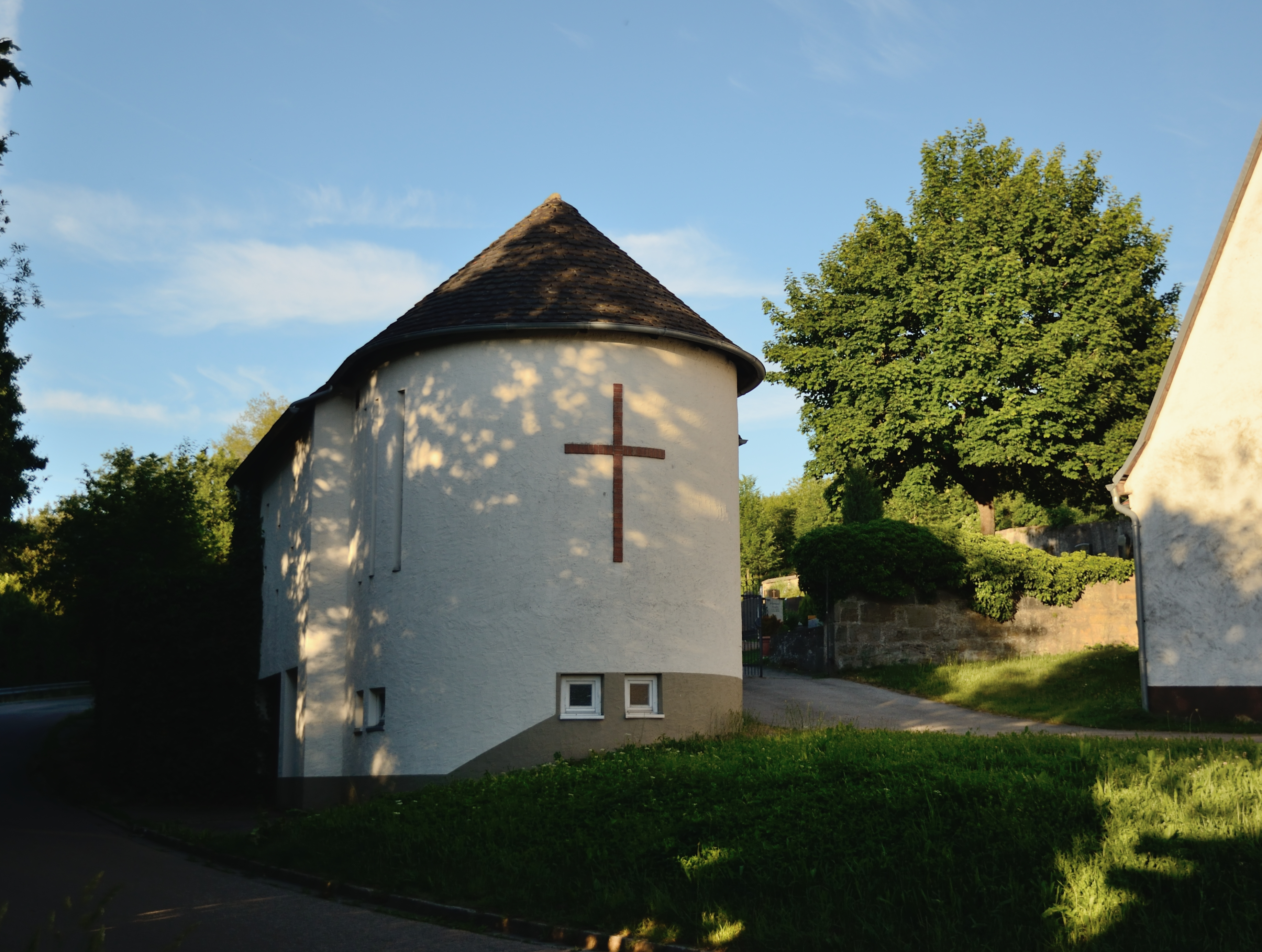 Aussegnungshalle der evangelisch-lutherischen Pfarrei St. Bartholomäus Brodswinden